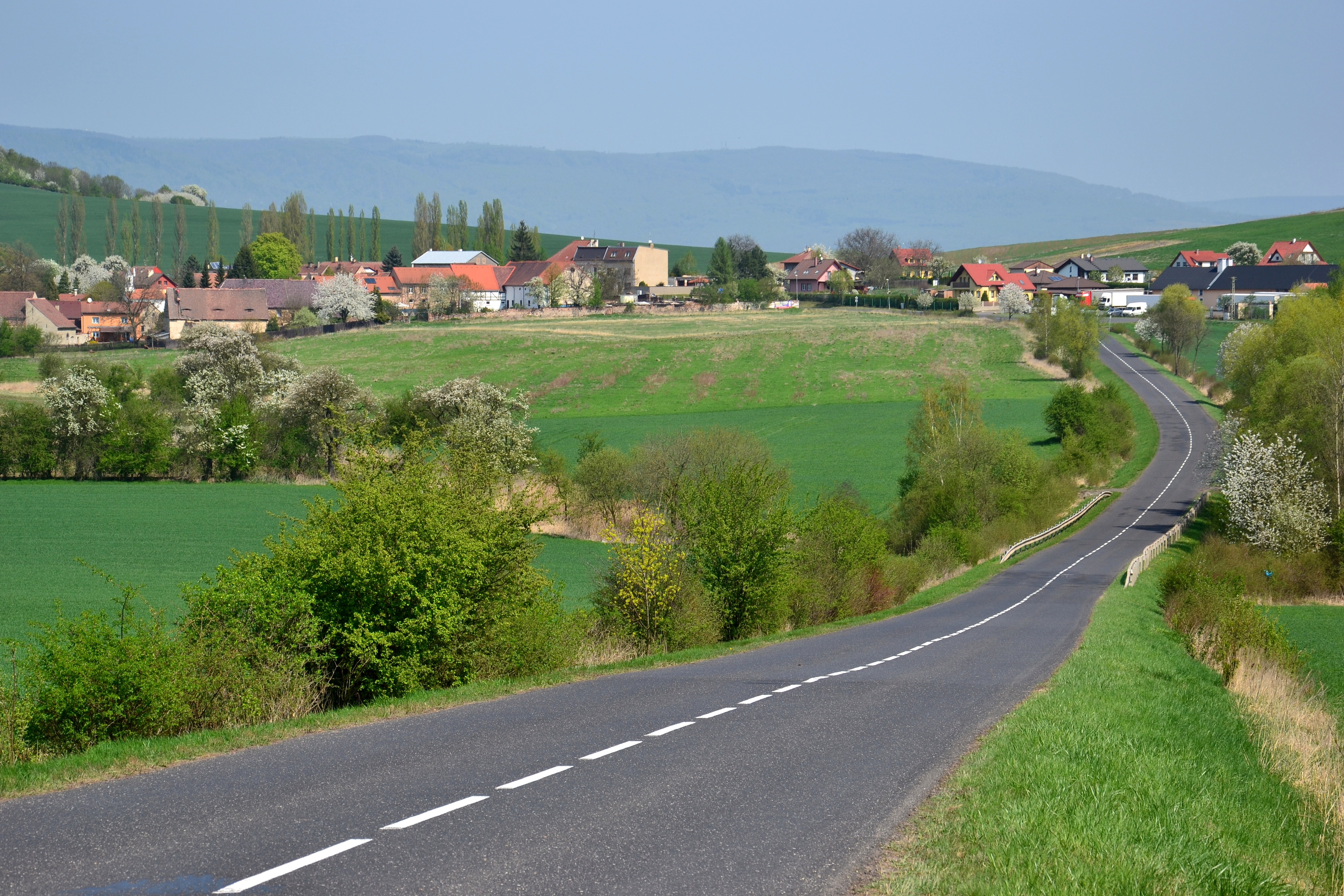 Suché – pohled z jihu